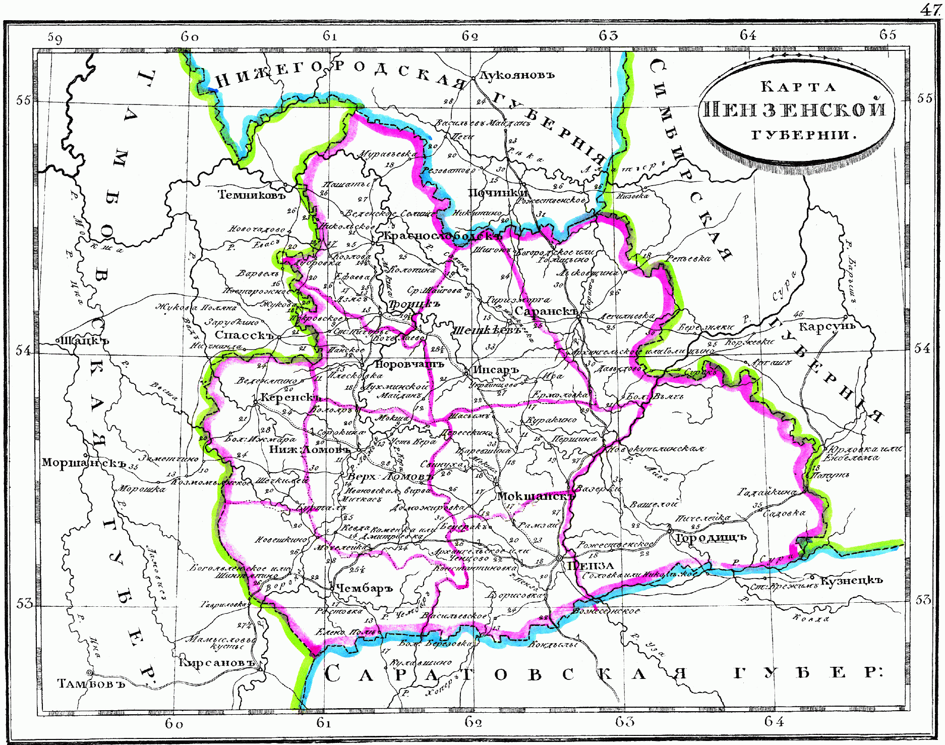 Карта Пензенской губернии, 1835